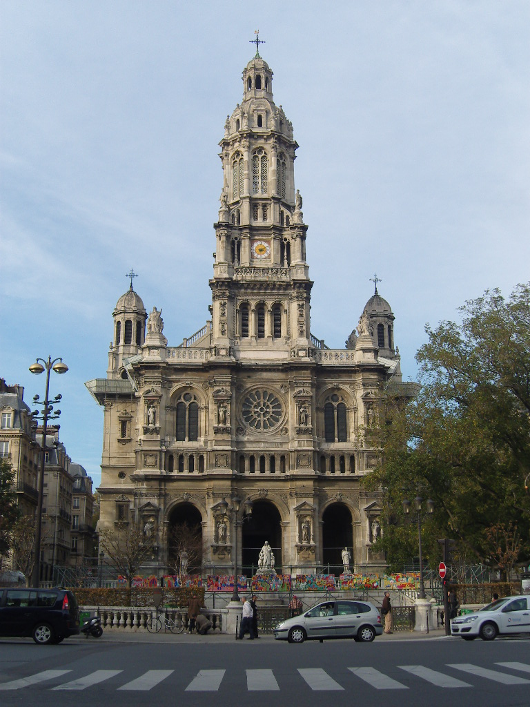 Église de la Sainte-Trinité de Paris vue de face